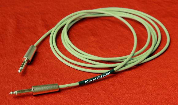 マージービート 60's ケーブル